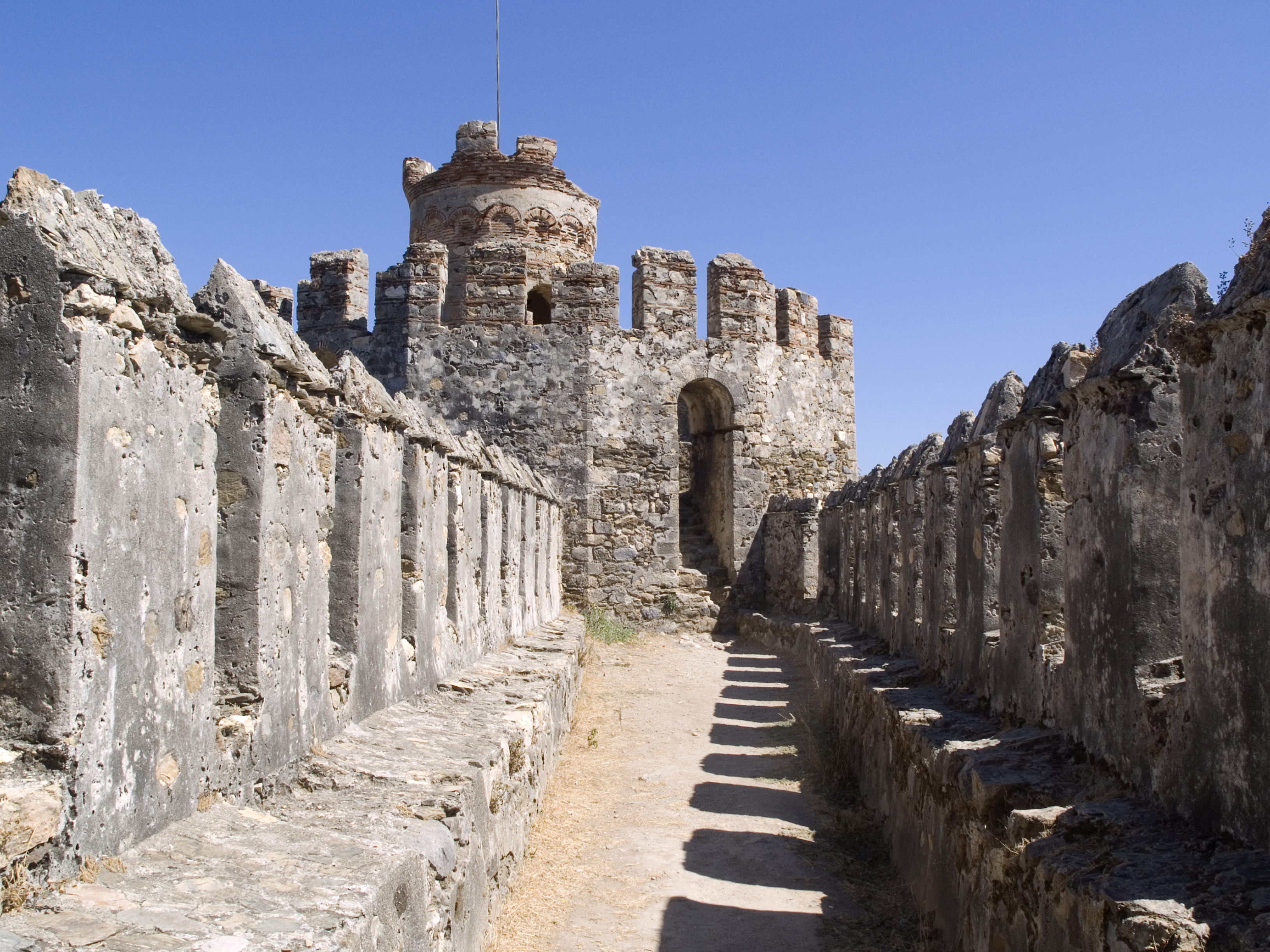 Турция, Анамур – Крепость Мамуре